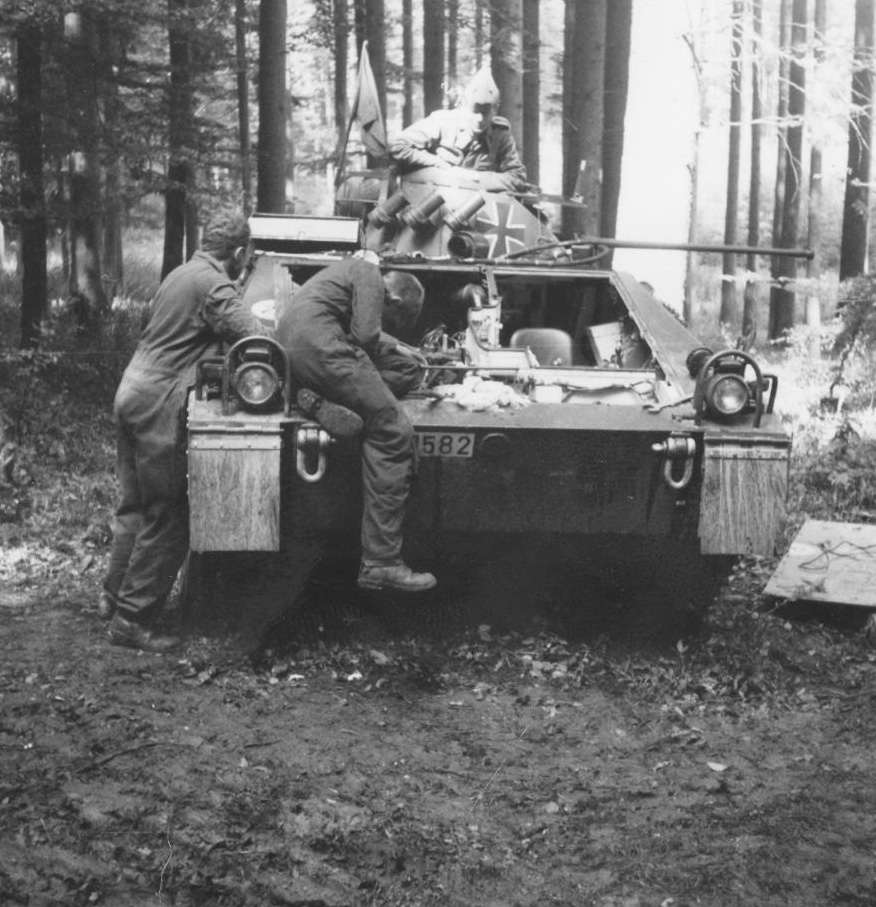 Instandsetzung eins Spz kurz Hotchkiss in einem Wald bei Nellingen, Höhe 744 m